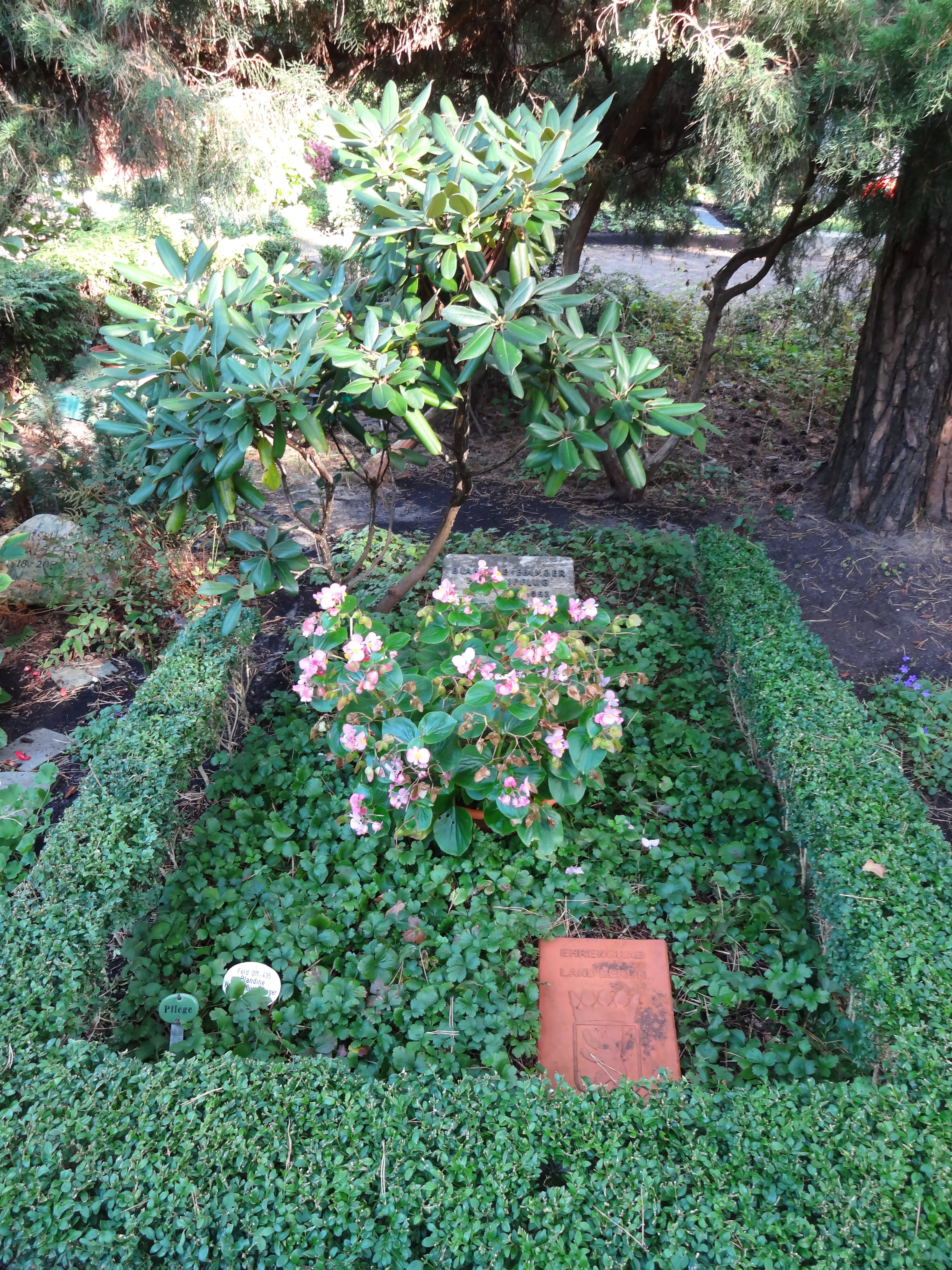 Ehrengrab für Ebinger, Blandine (Hassenpflug) auf dem Waldfriedhof Dahlem; der Friedhof ist ein Gartendenkmal in BerlinThis is a photograph of an architectural monument.